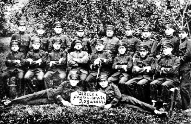 Oddelek finančne kontrole v Rogaševcih.